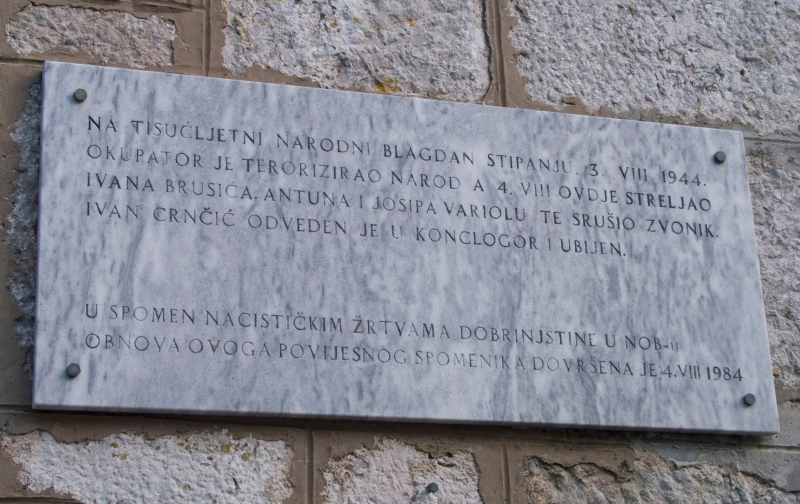 Spomen ploča na crkvi Svetog Stjepana u Dobrinju na otoku Krku